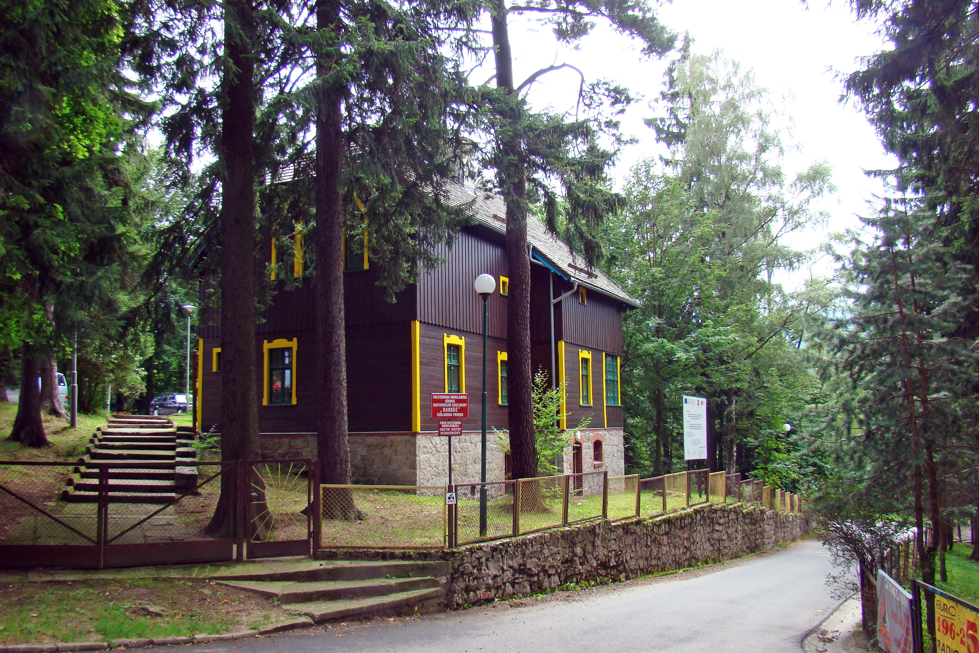 Ehemaliges Wohnhaus von Hermann Hendrich in Szklarska Poręba, Muzealna 5